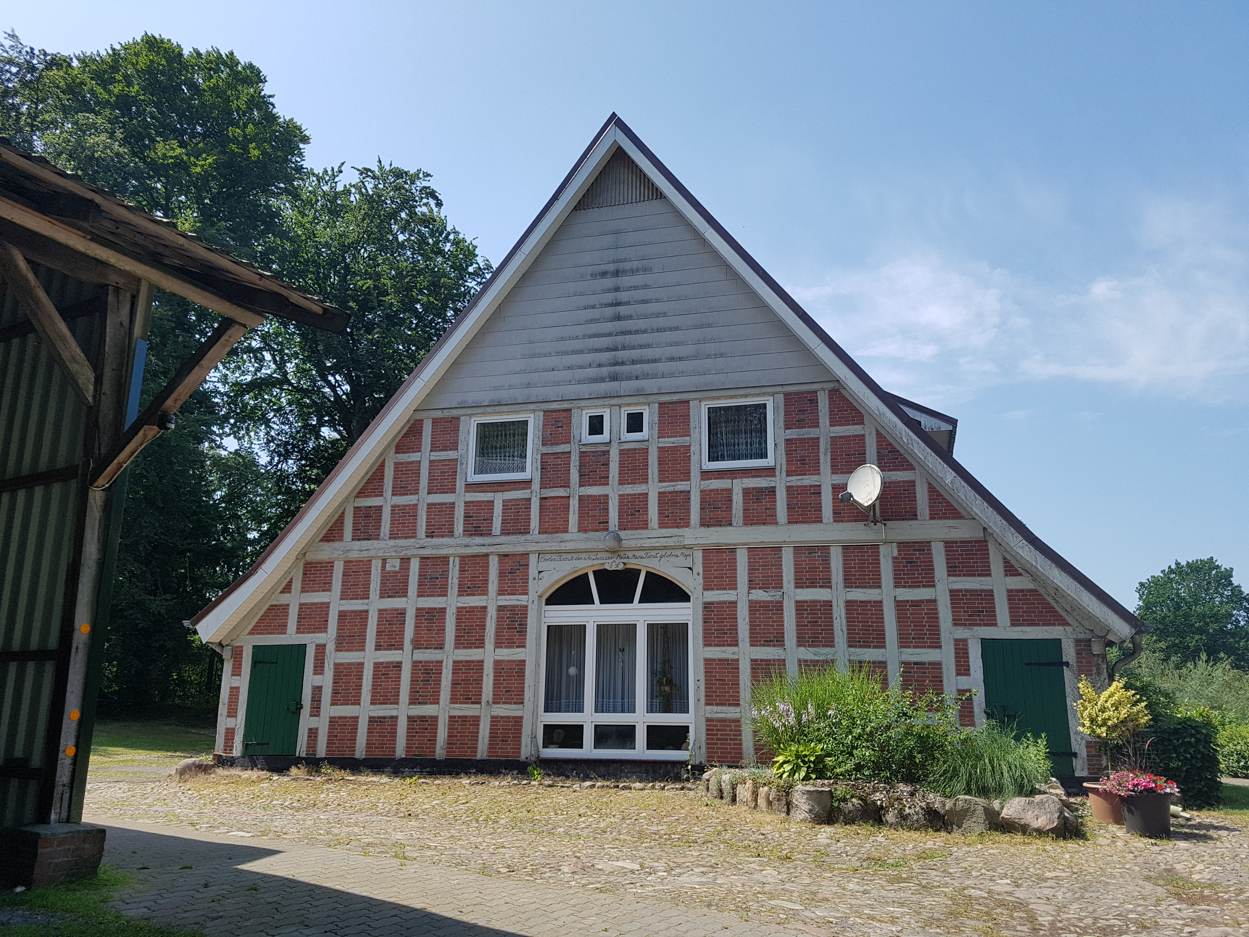 zur Pulvermühle in Heeßel zugehöriges Fachhallenhaus